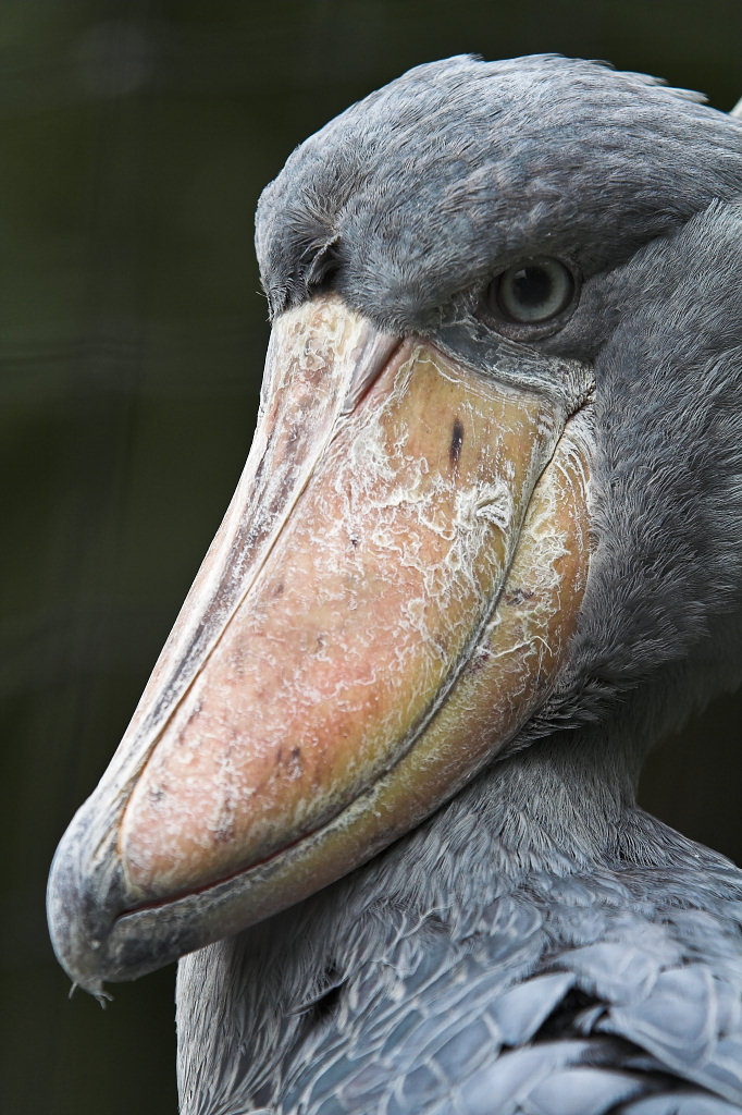 מנעלן